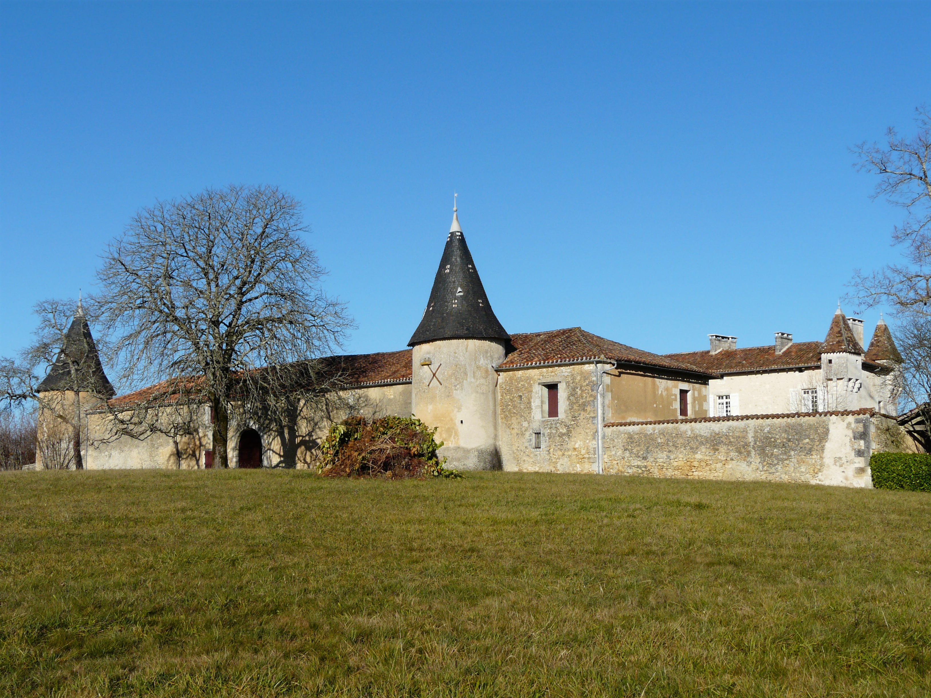 Manoir de Boslaurent, La Chapelle-Faucher, Dordogne, France